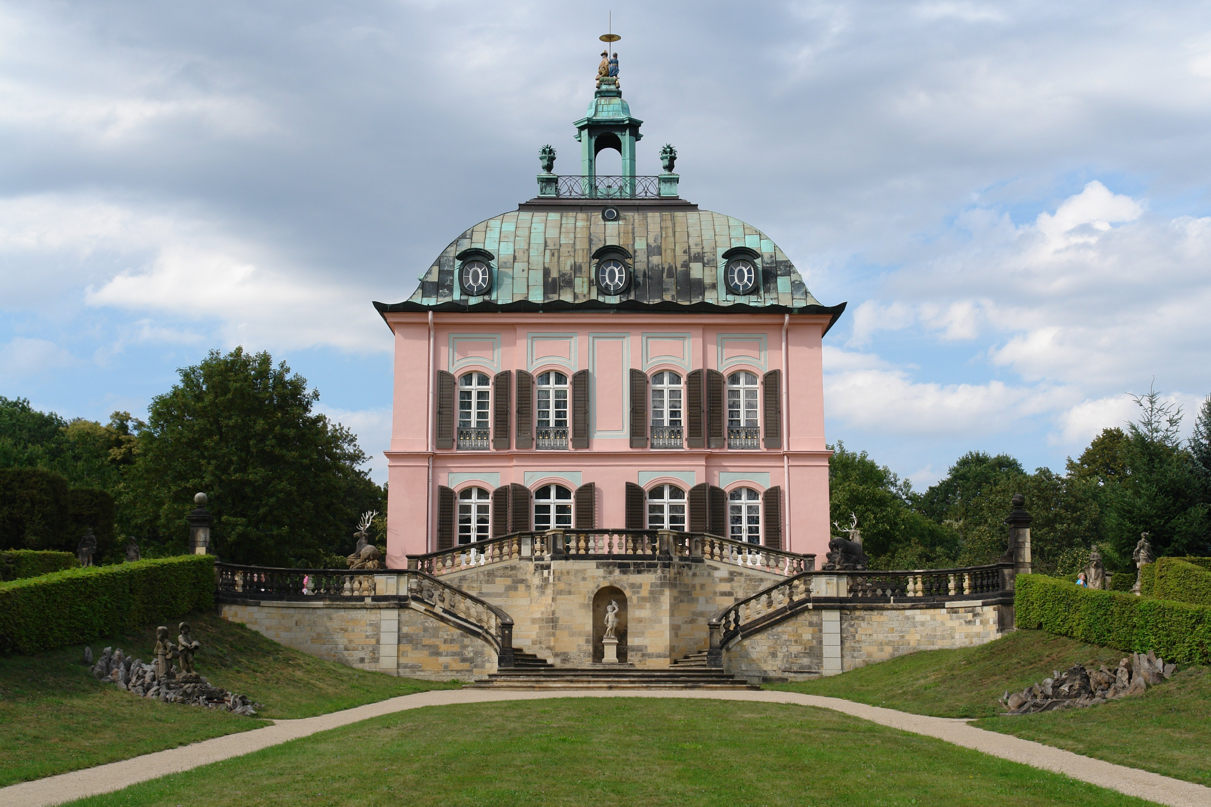 Fassanenschlösschen Moritzburg One can see 11 statues on this image.